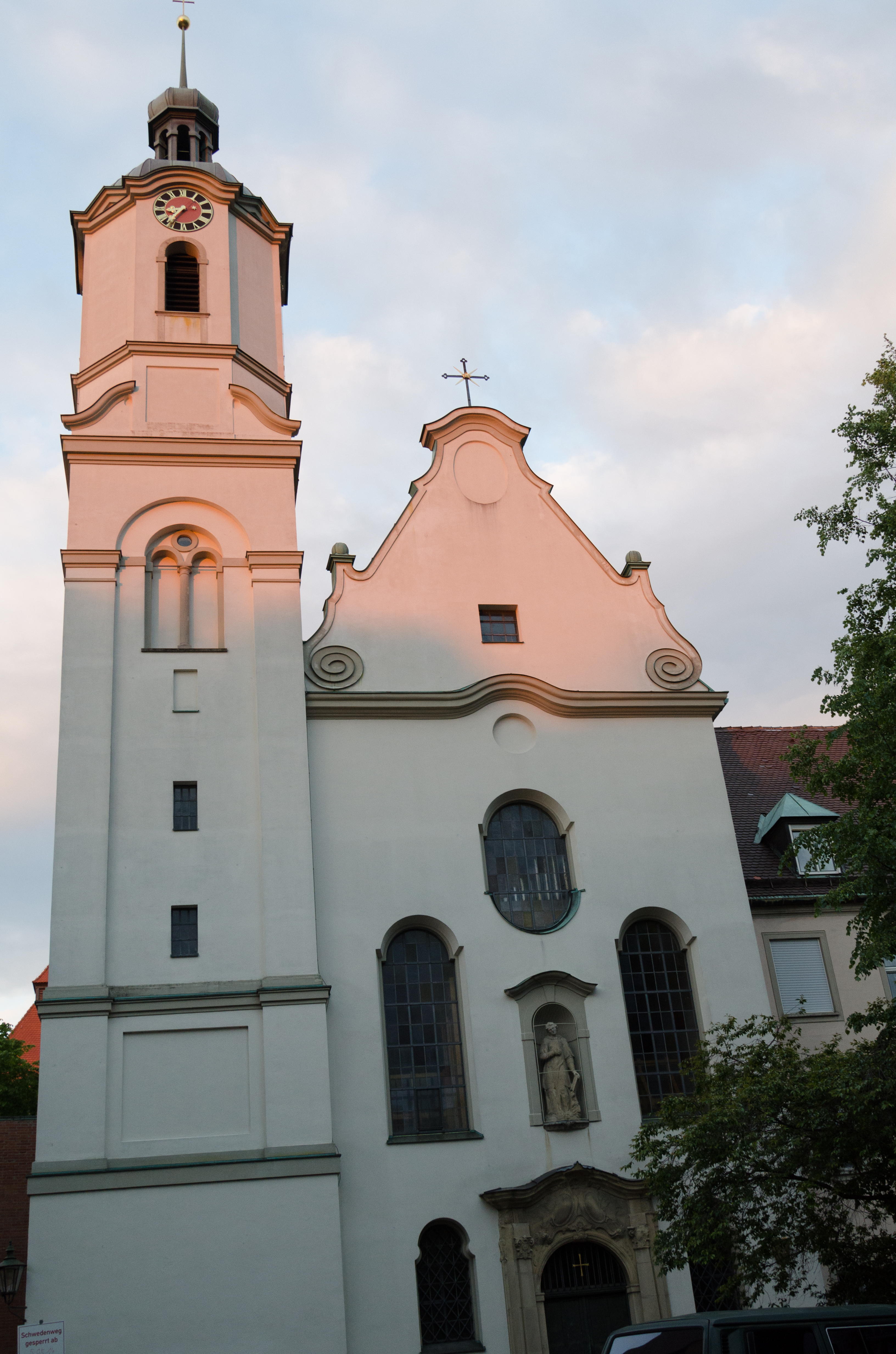 Augsburg, Stephansplatz 6, St. Stephan